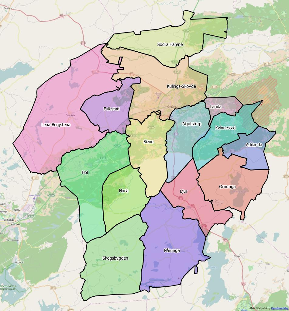 Distriktsindelningen i Vårgårda kommun World file 57.39761409951685067 0 0 -57.39761409951685067 1393479.87628445029258728 7994064.78872951772063971